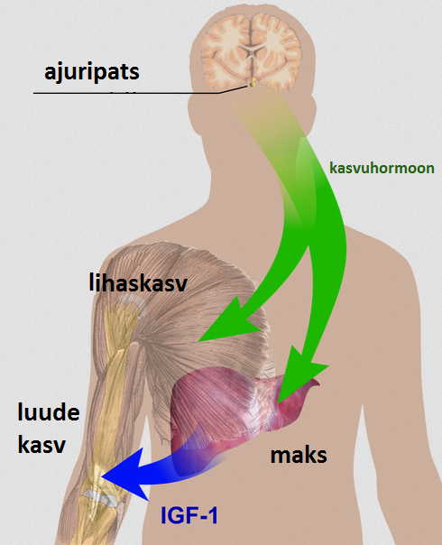 Peamine kasvhuhormooni teekond läbi endokriinsüsteemi.